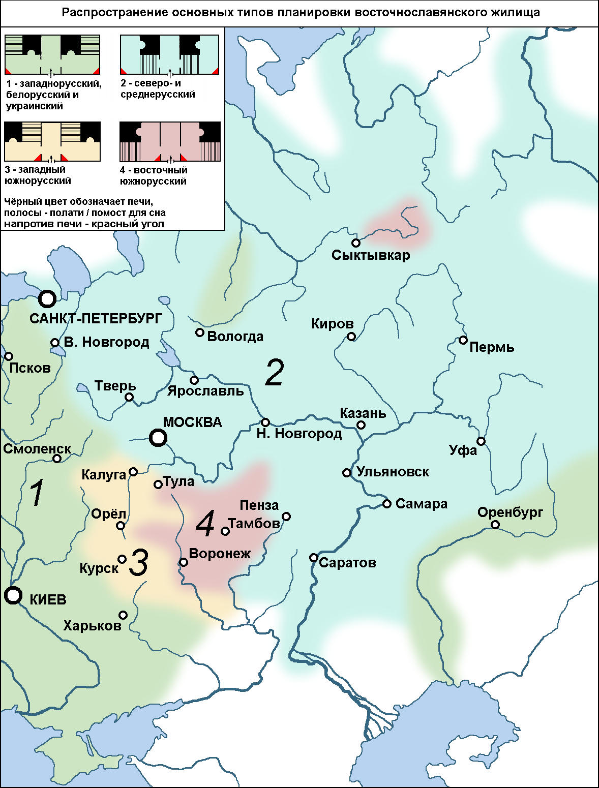 Распространение основных типов планировки восточнославянского жилища. По Е. Э. Бломквист